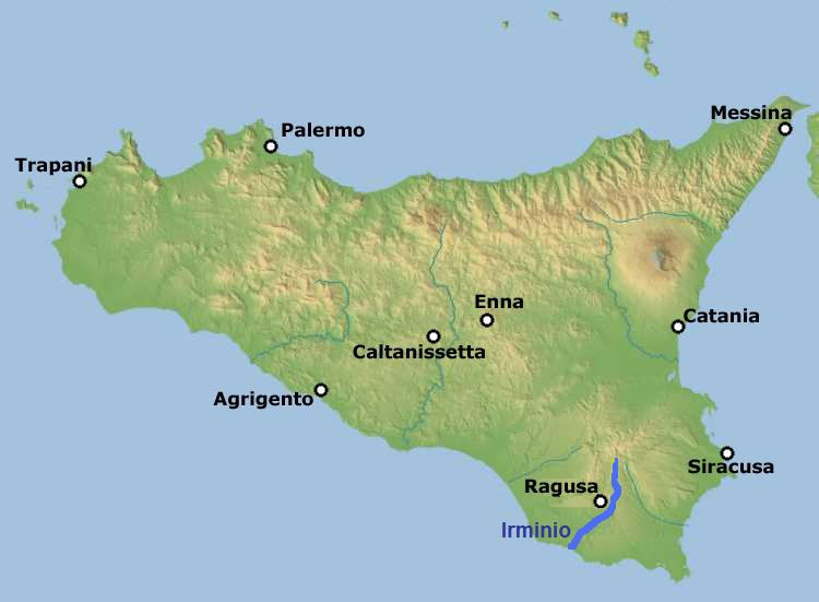 Carte du parcours de l'Irminio en Sicile